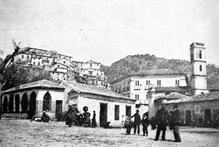 Gioiosa Jonica Chiesa del Rosario fino al 1928